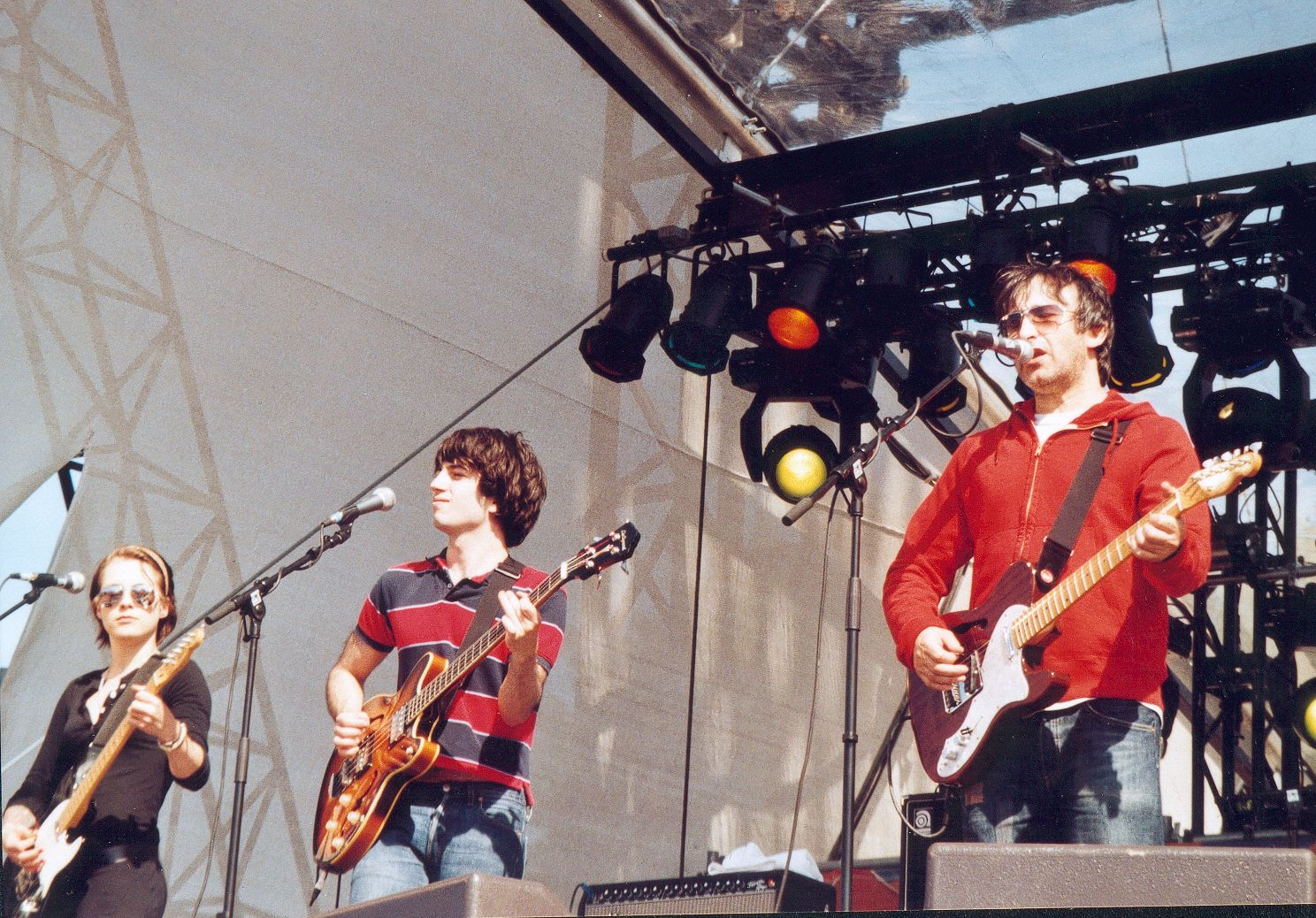 Lightning Seeds/Ian Broudie, Eröffnungsfest Fußball-WM 2006 in Hamburg